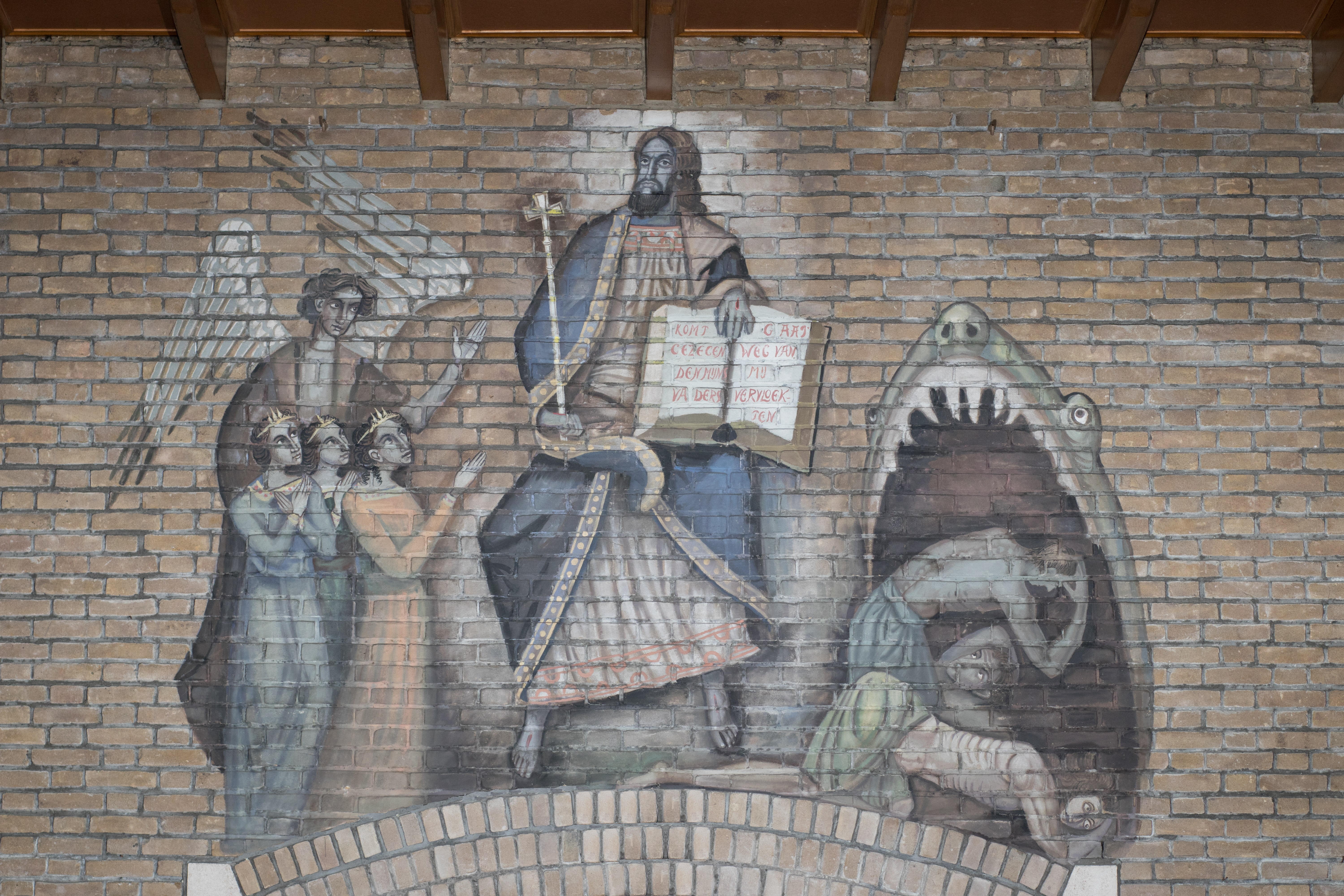 Muurschildering boven hoofdingang van de kerk in Steenwijksmoer